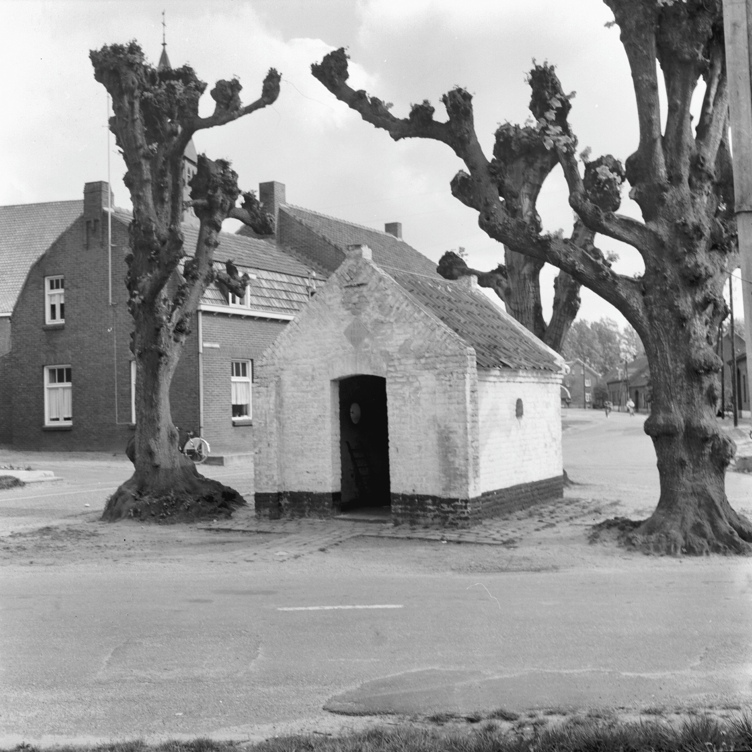 Diversen: Wegkapel